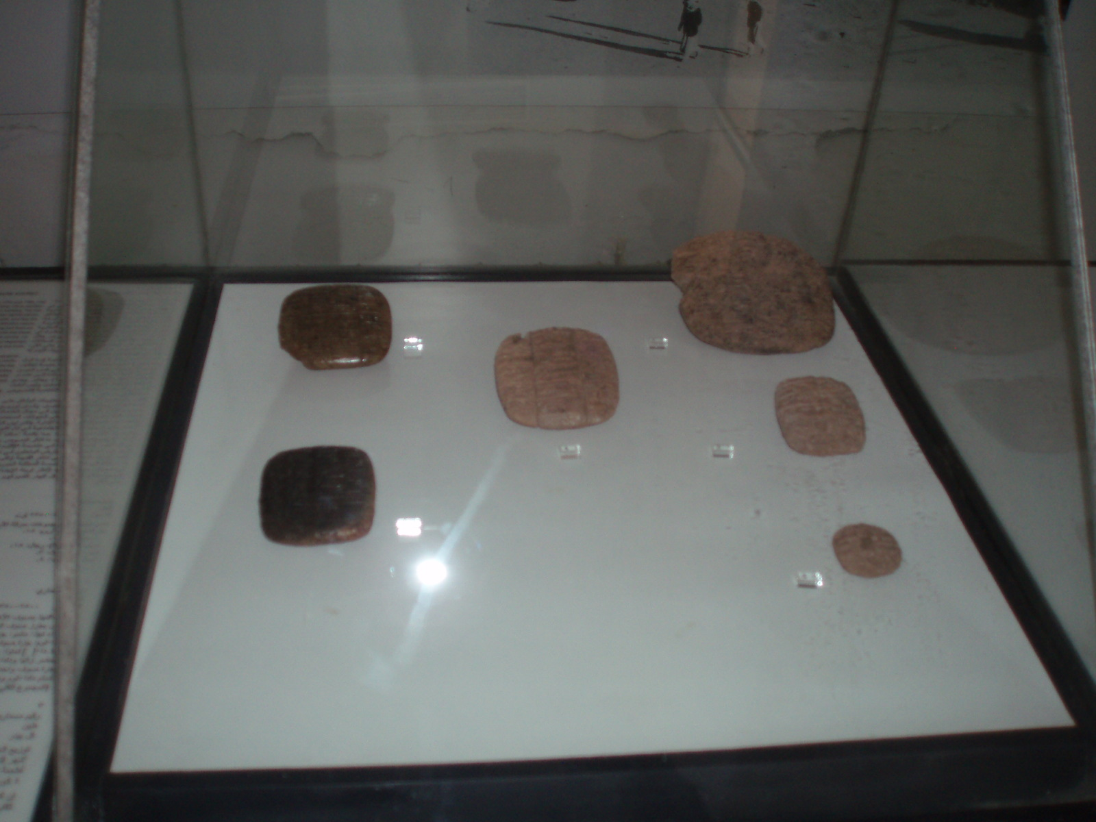 Artifacts in Deir ez-Zor Museum